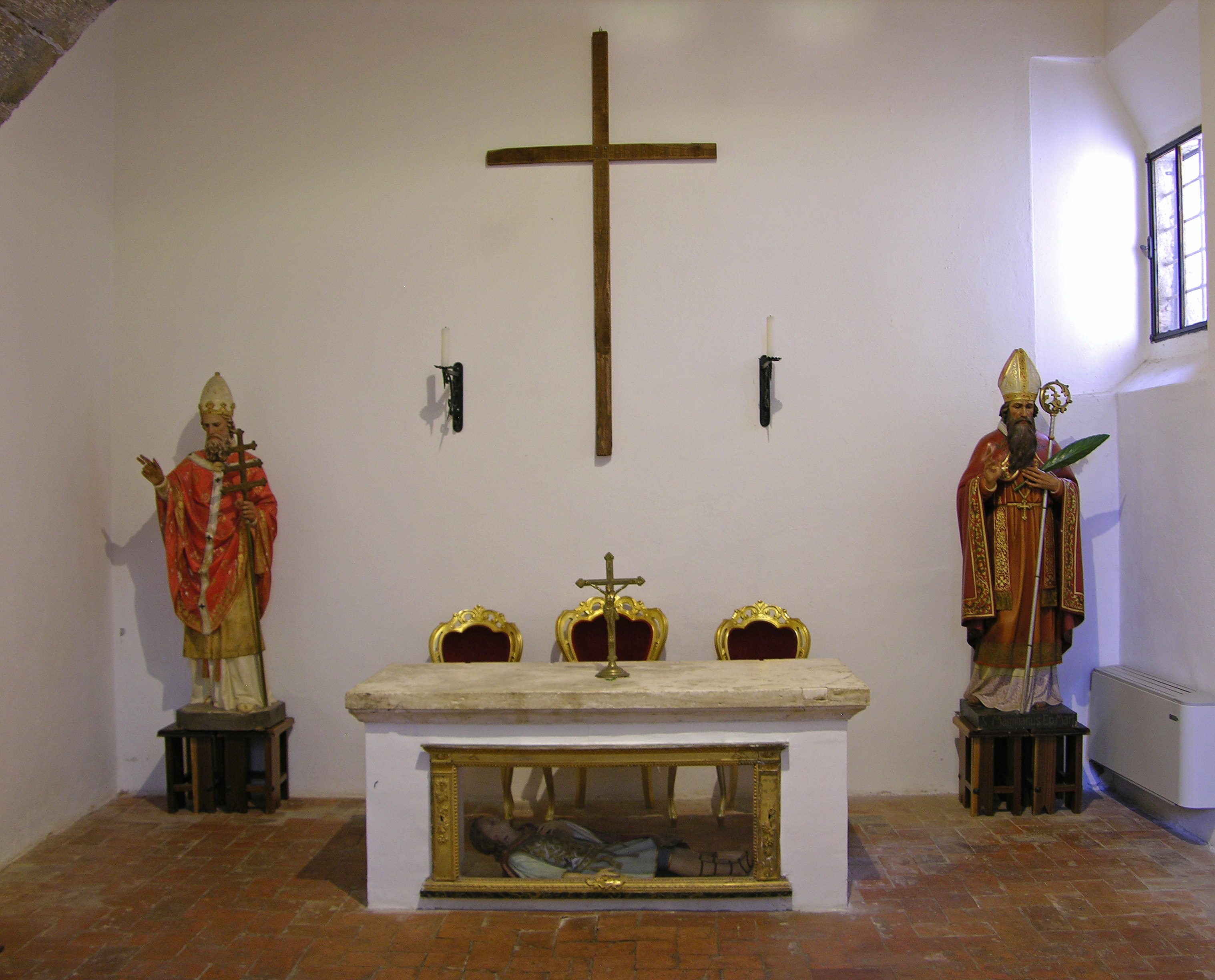 Altare laterale del Duomo di Sovana (GR), Italy.